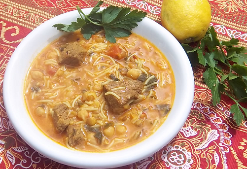 Soupe traditionnelle du Maroc servie surtout pendant le jeûne du mois sacré de Ramadan